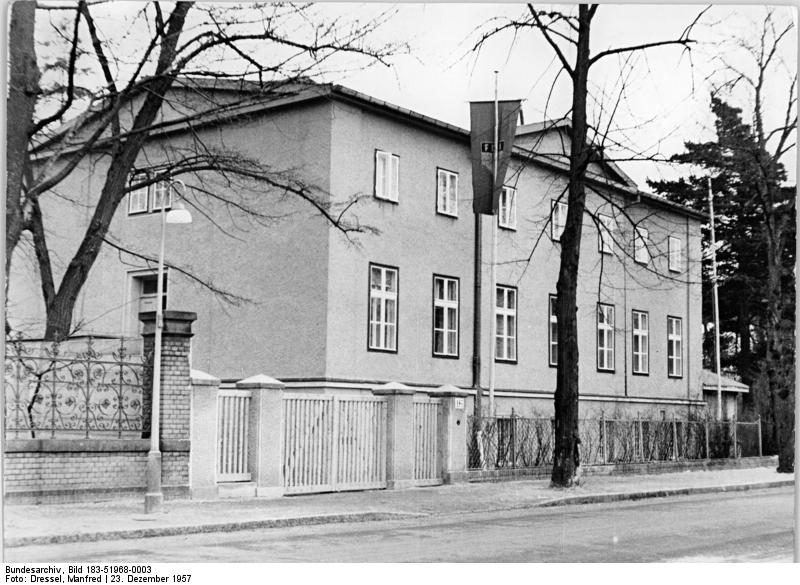 Berlin, Grünau, Regattastraße, Jugendherberge Zentralbild Dressel Dr-Ho. 23.12.1957 Was wir im Jahre 1957 schufen - Jetzt hat auch Berlin eine Jugendherberge - In Berlin-Grünau wurde kürzlich eine Jugendherberge ihrer Bestimmung übergeben. Junge Gäste aus der DDR haben hier schon Unterkunft gefunden. UBz: die Jugendherberge an der Regattastrasse in Berlin-Grünau.